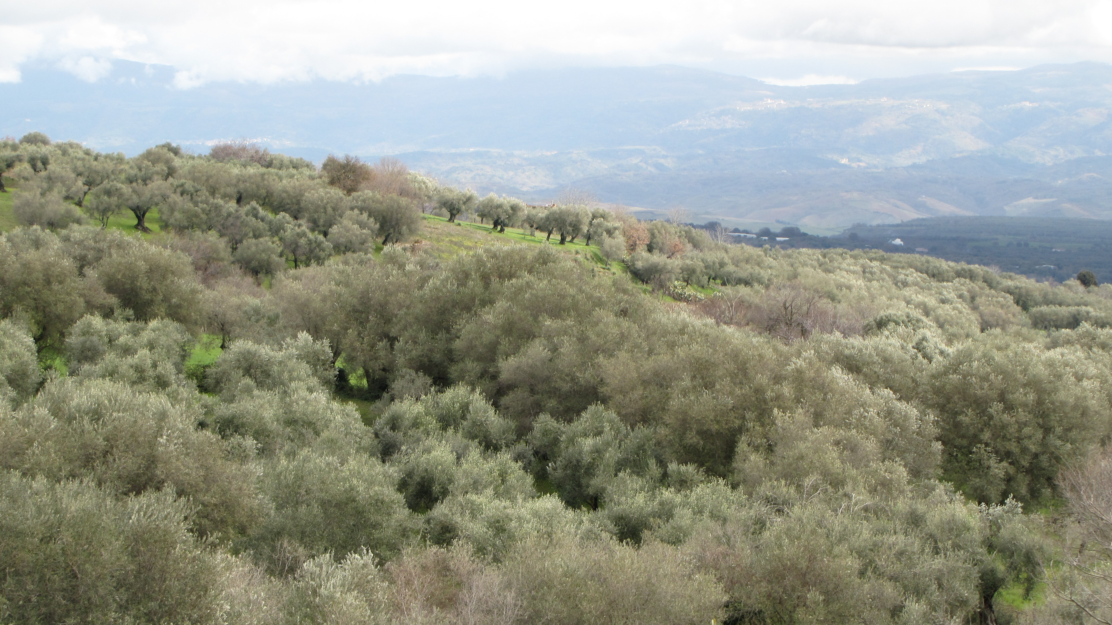 uliveto nel comune di Filandari in provincia di Vibo Valentia